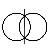 Symbol nach IEC 60417-5xxx